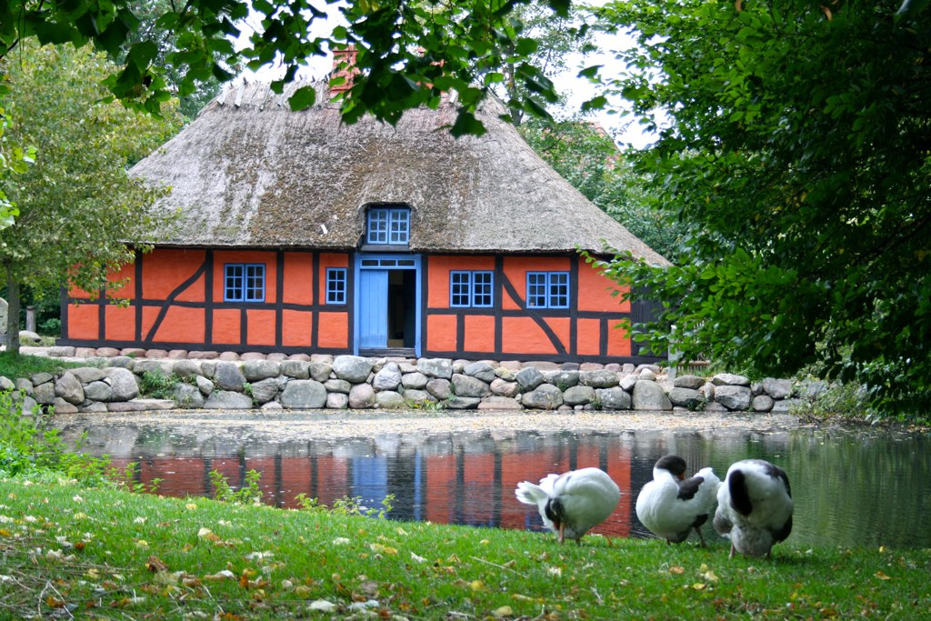 By Benno Hansen